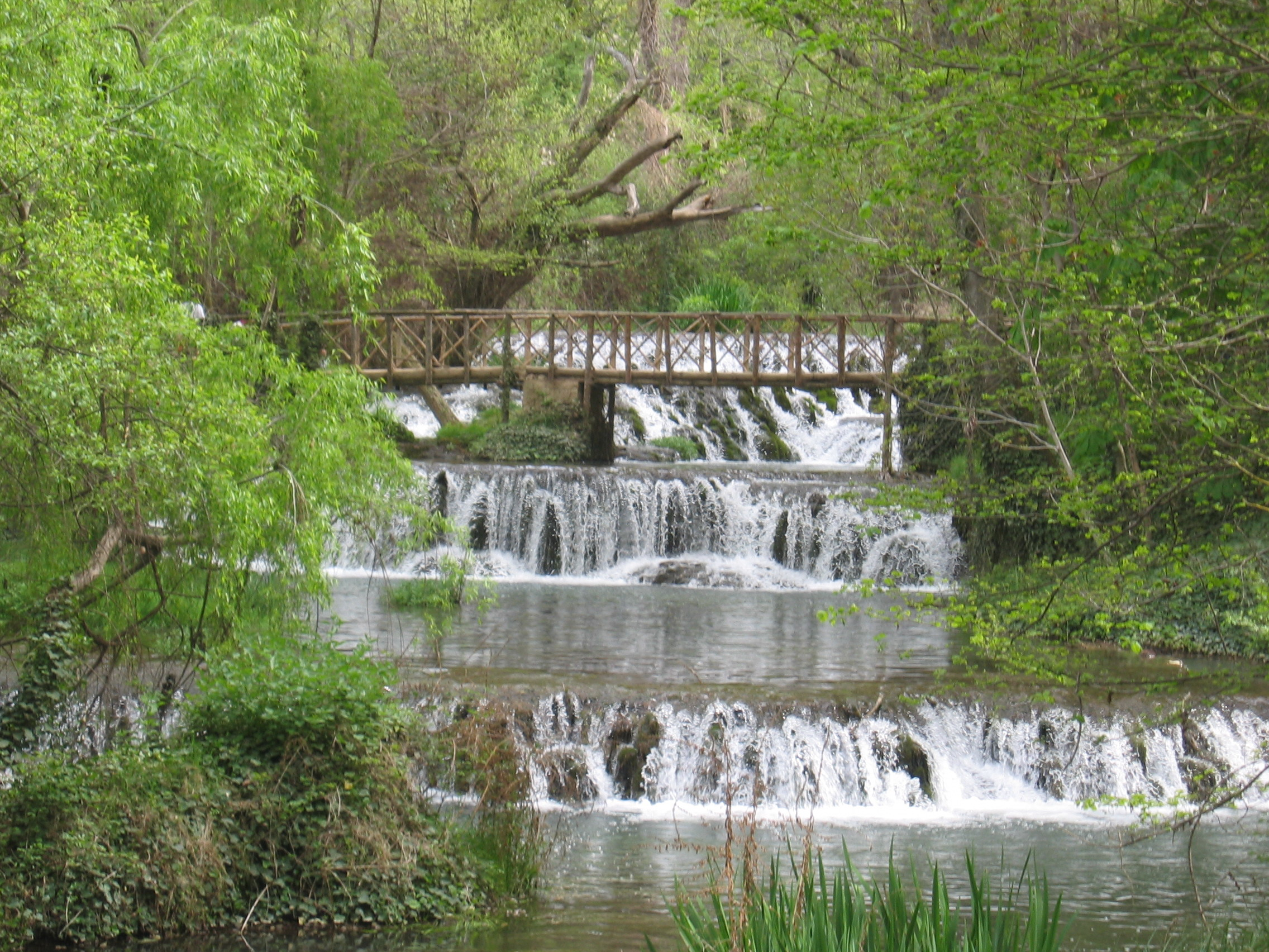 Imatges del Monasterio de Piedra